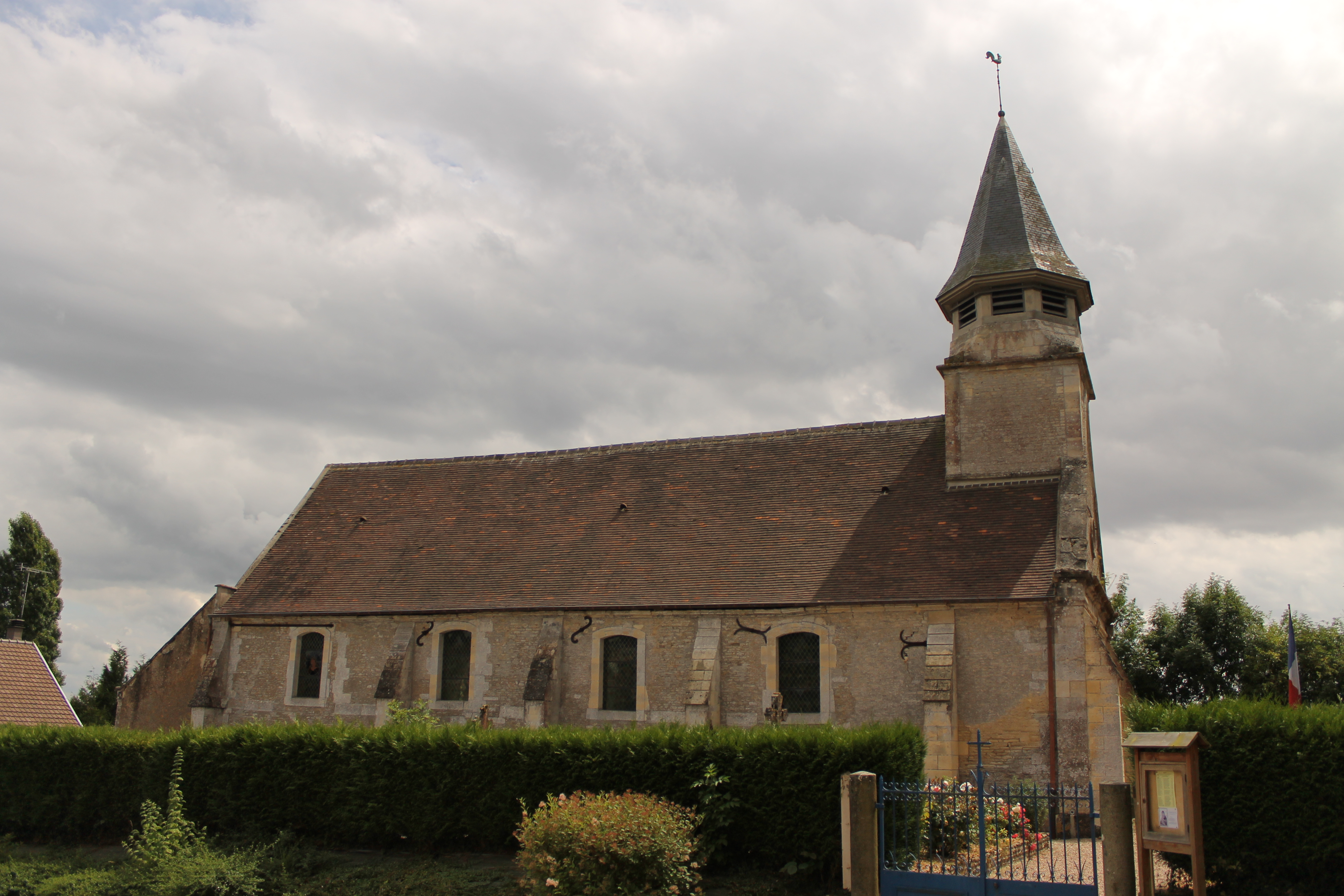 Église Sainte-Croix de Bissières (Calvados)